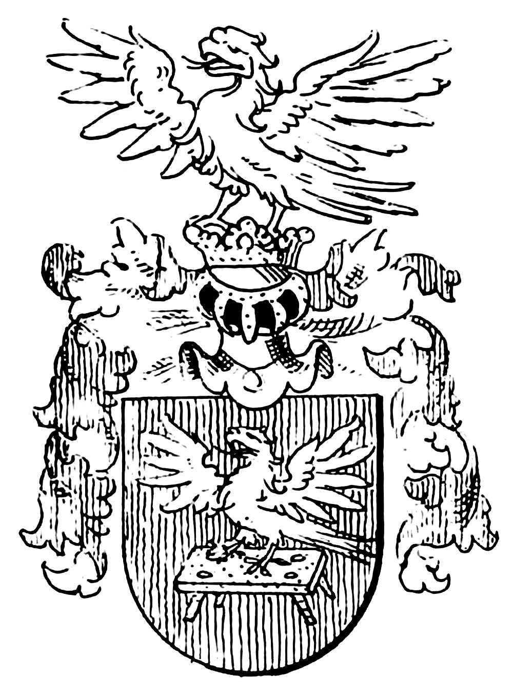 Wappen der von Bank (Banck)